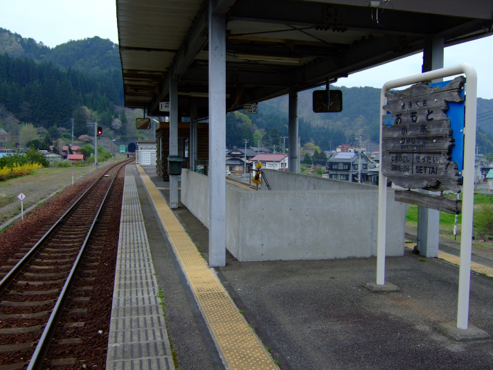 小本駅ホーム